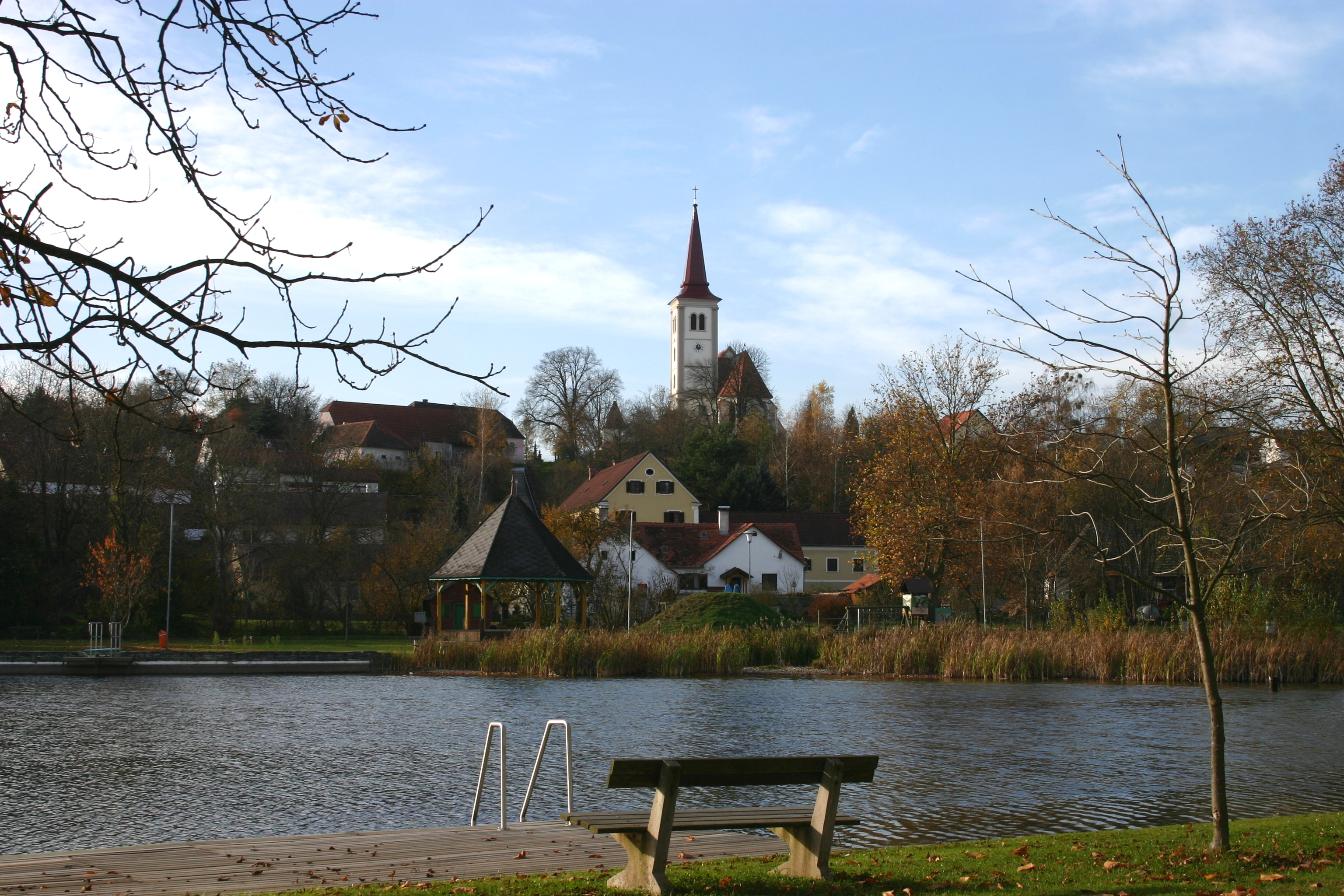 Burgau Naturbadeteich beim Schwimmbad